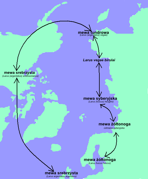 Diagram ukazujący gatunek pierścieniowy na przykładzie mewy srebrzystej (Larus argentatus) oraz mewy żółtonogiej (Larus fuscus) traktowanych przez wielu autorów jako jeden gatunek.